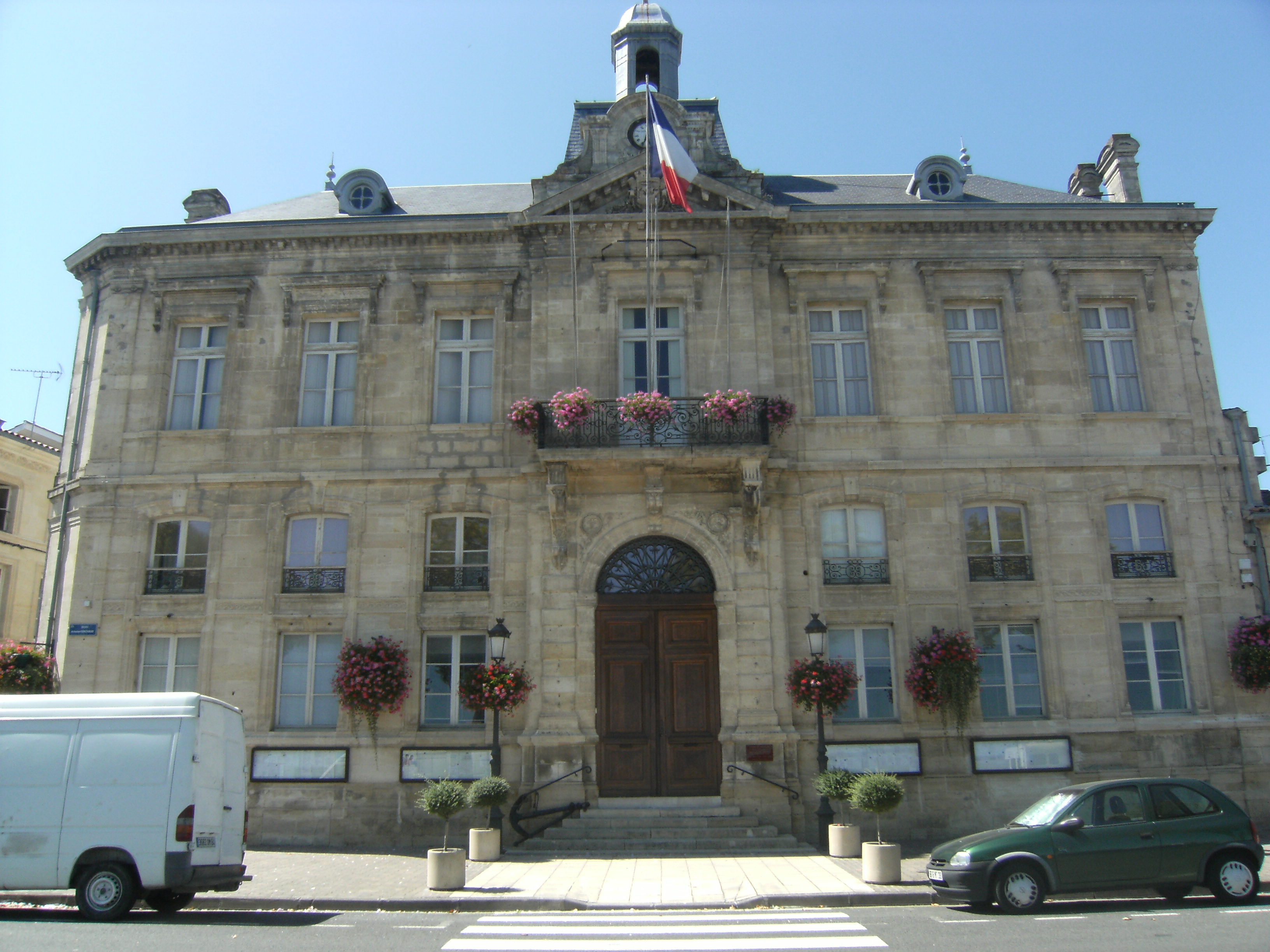 Mairie de Pauillac (Gironde, France) vue de face